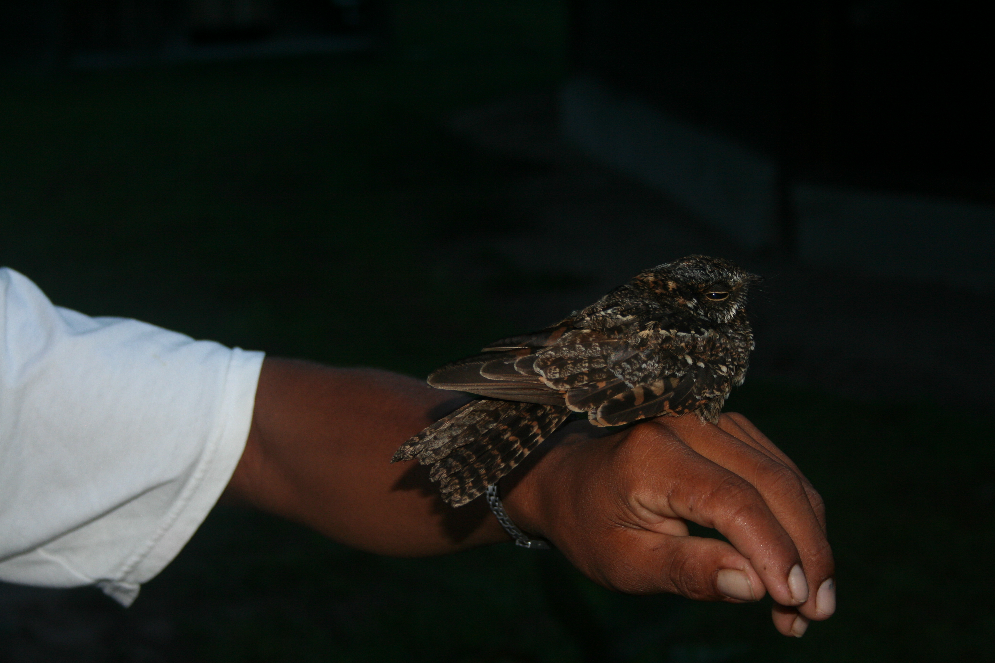 Spot-tailed Nightjar (Caprimulgus maculicaudus), Rewa ecolodge